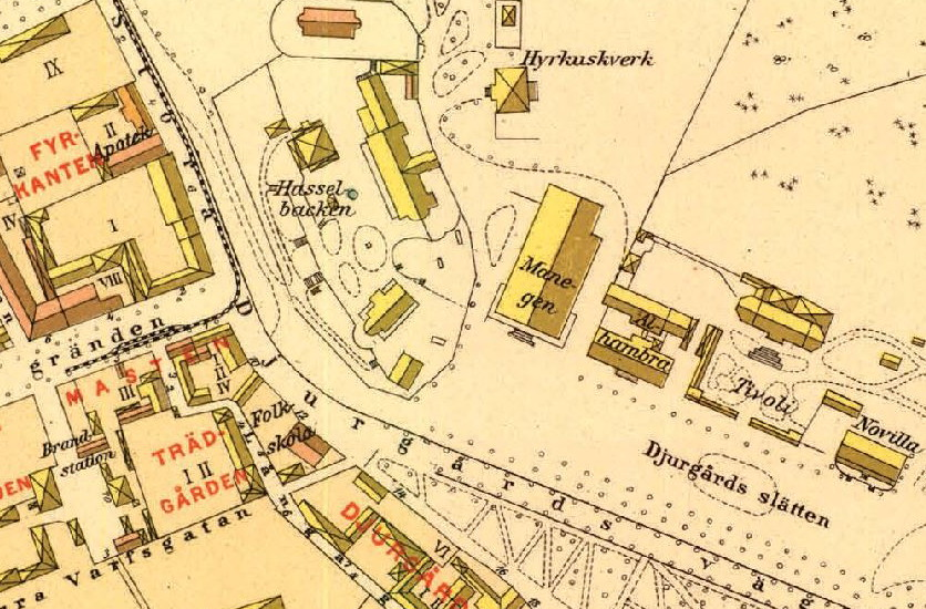 Mothanders manège på Djurgården på del av 1885 års karta över Stockholm